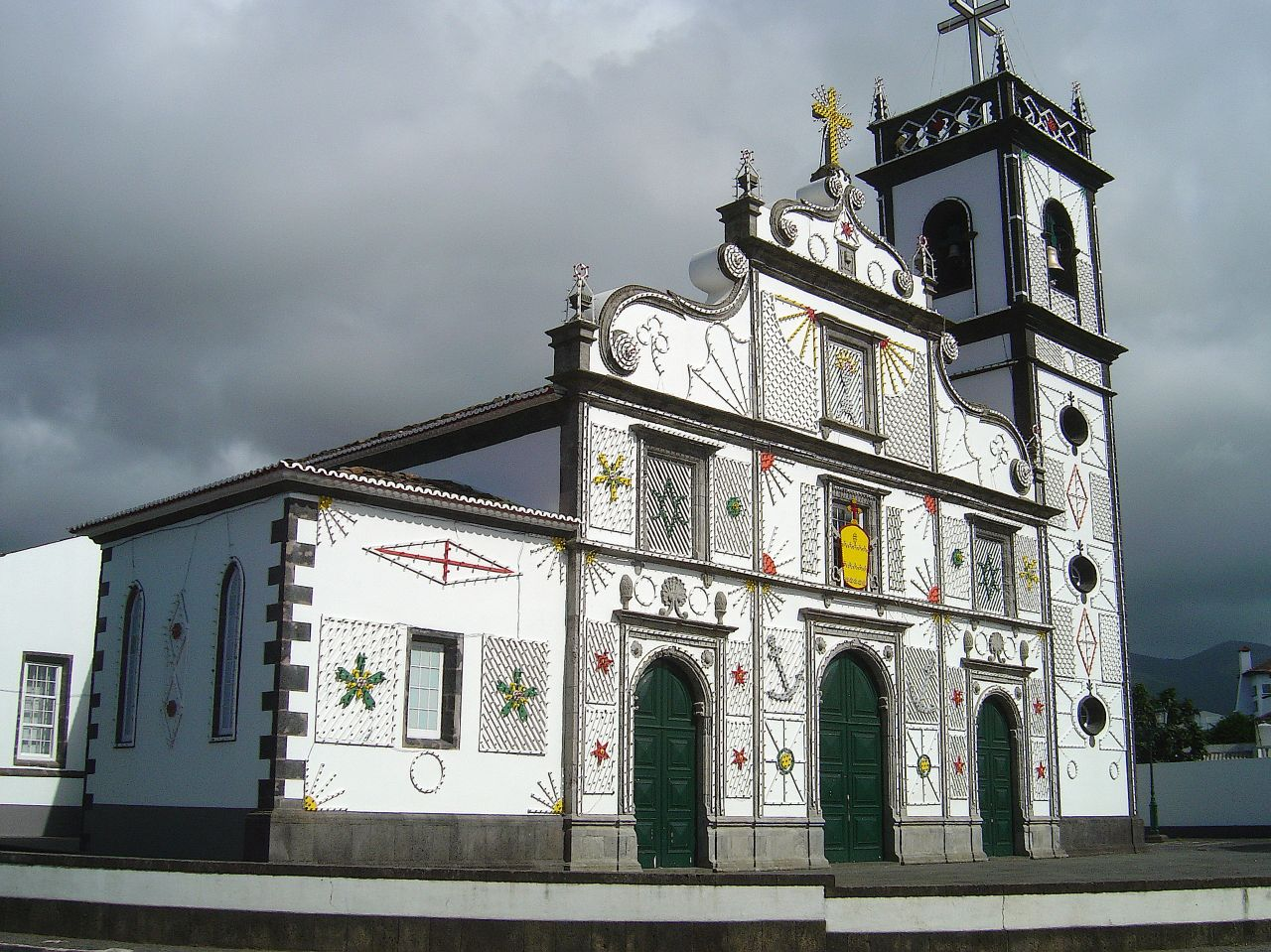 Ribeira Seca - Ilha de São Miguel - Portugal